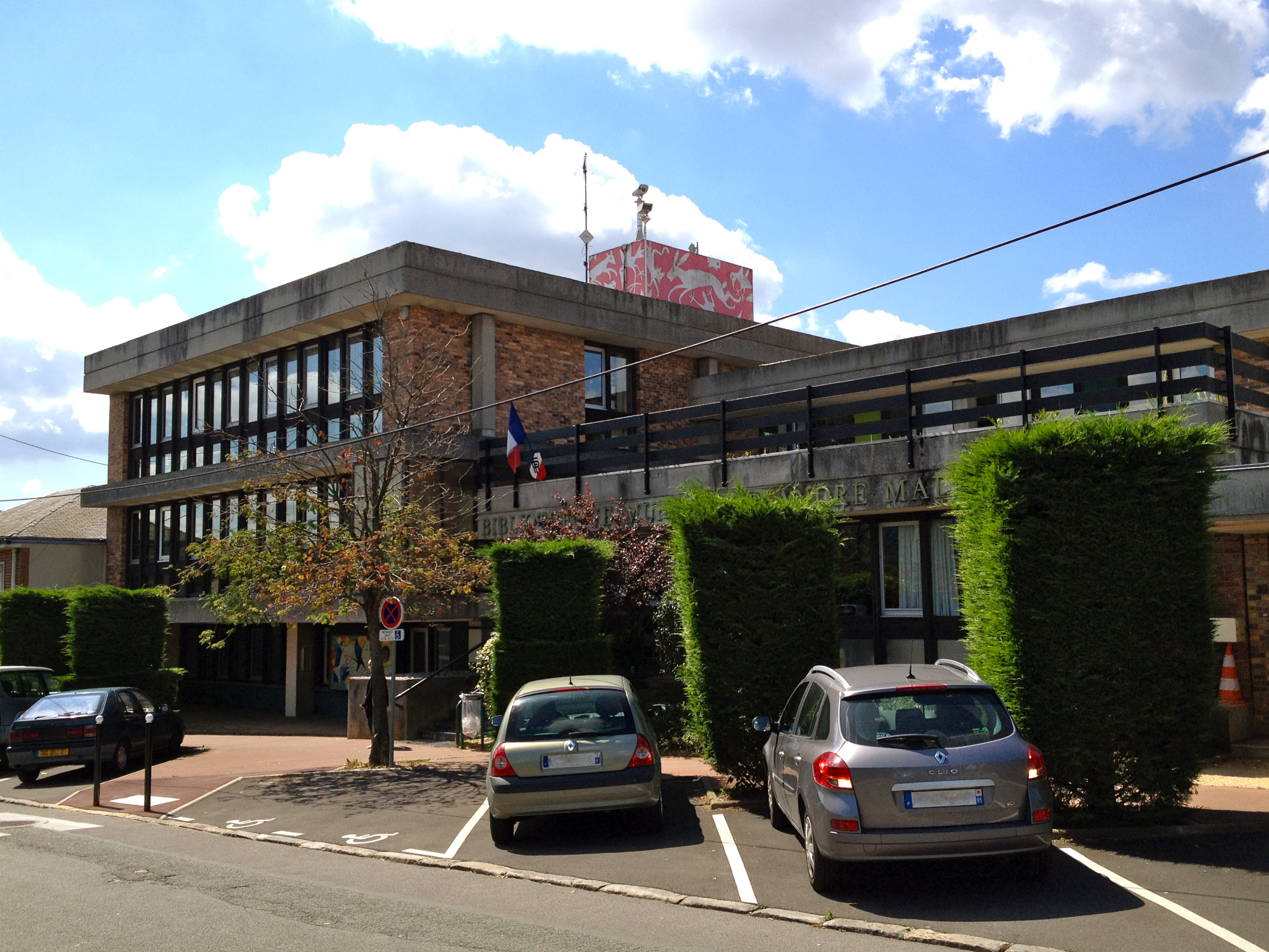 La bibliothèque André Malraux de Savigny-sur-Orge (91)